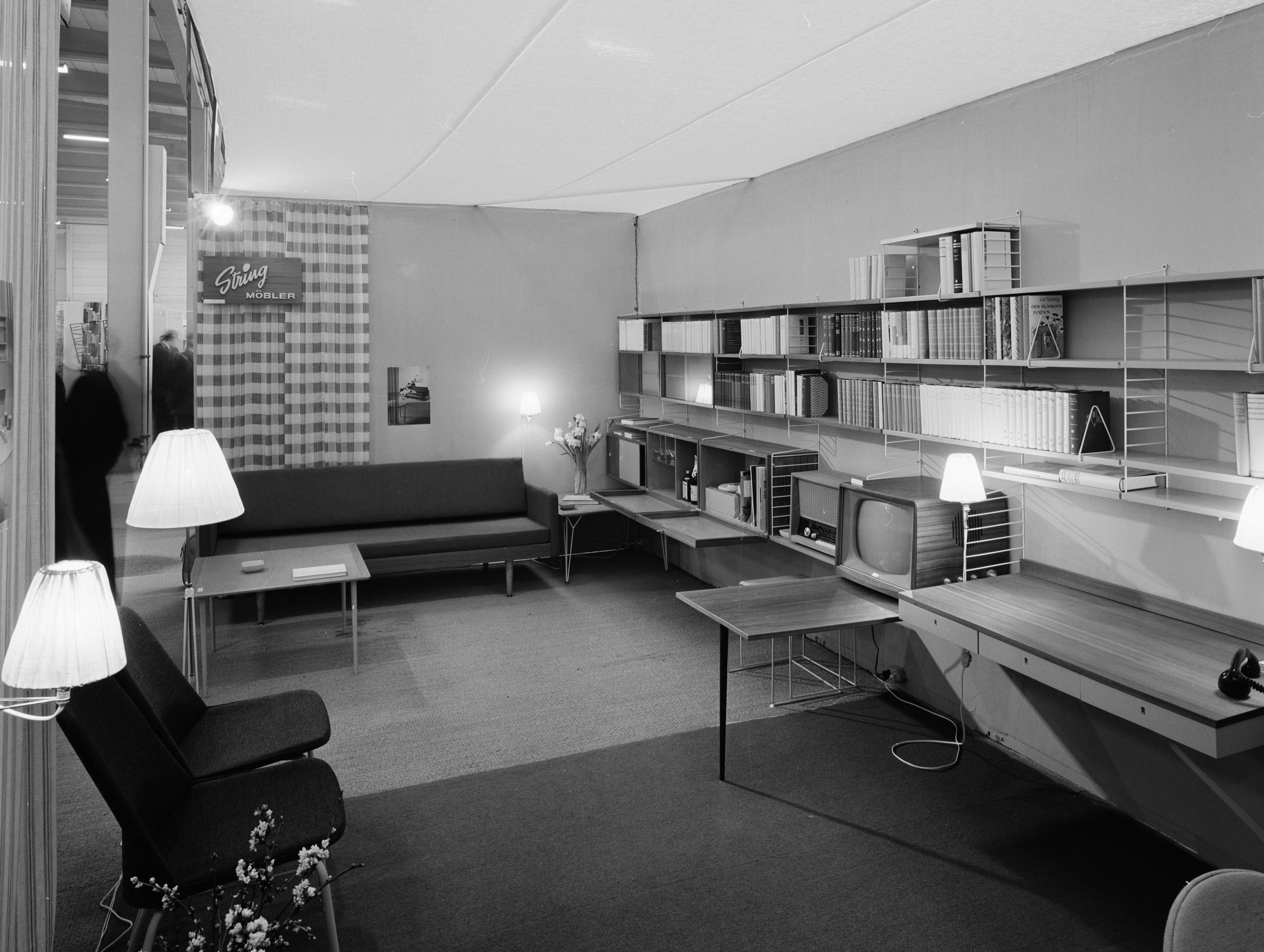 Sankt Eriks-Mässan 1957 Interiör